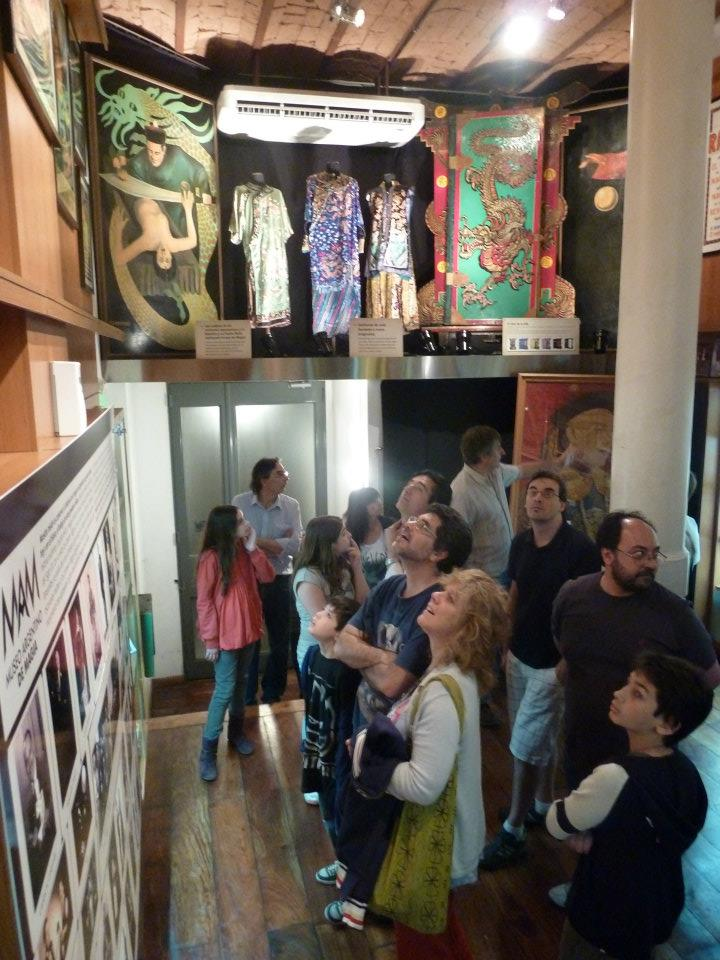 Noche de los Museos en Museo Argentino de Magia, Bazar de Magia, Buenos Aires, Argentina.